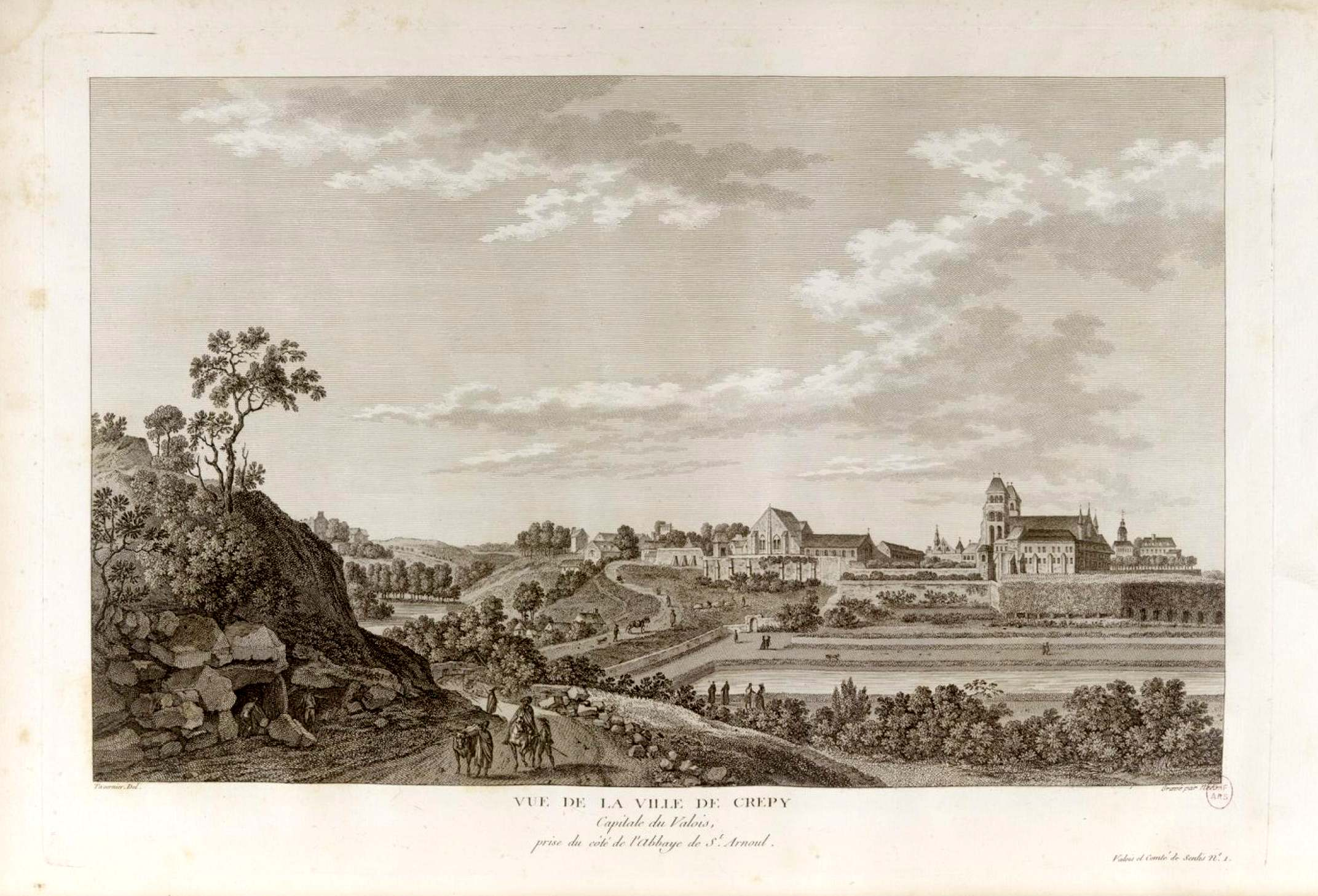 Vue sur la ville de Crépy, capitale du Valois, prise près du côté de l'abbaye de St-Arnoul (Valois et comté de Senlis, n° 1).